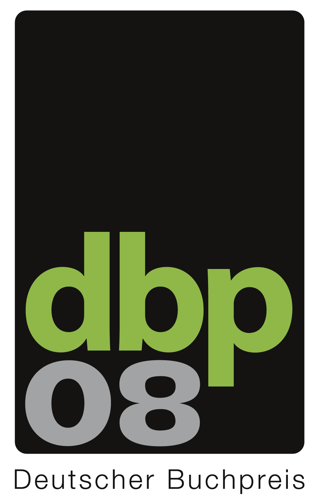 Logo Deutscher Buchpreis 2008